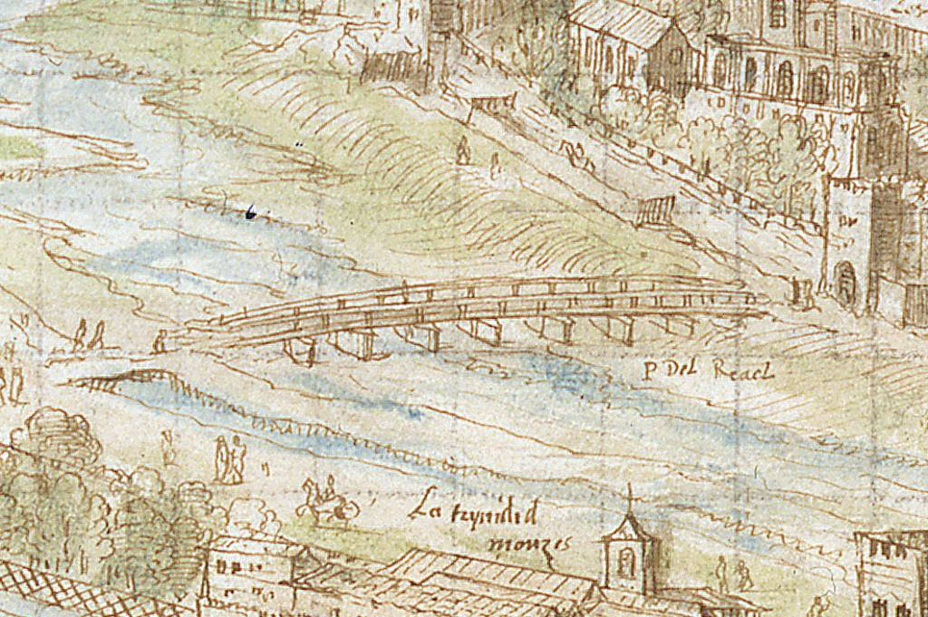 Pont del Real sobre el riu Túria en la vista de la ciutat de València de 1563, feta per Anton van den Wijngaerde. Aleshores un pont de fusta, anterior a l'actual.